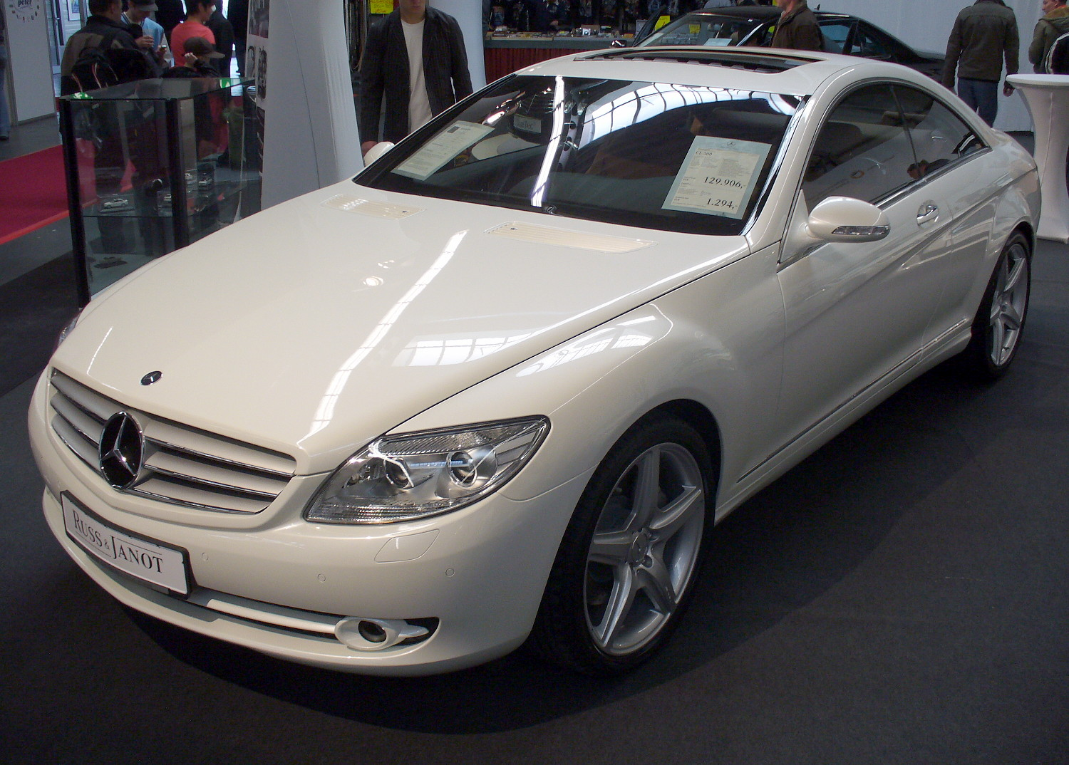 Mercedes-Benz C216